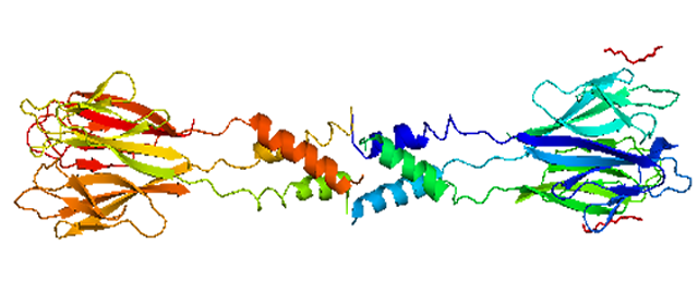 Resistin